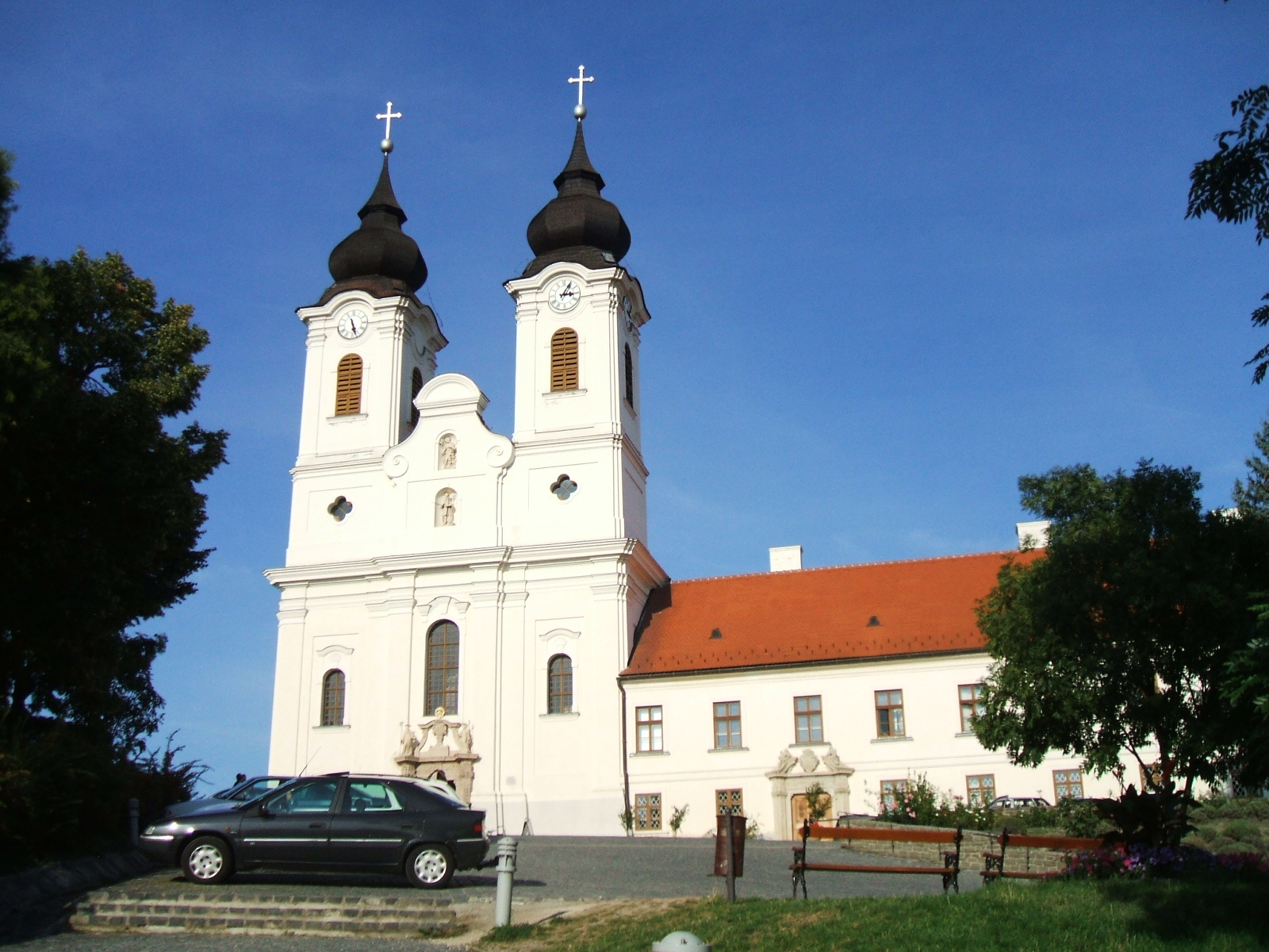 Tihany abbey, Hungary